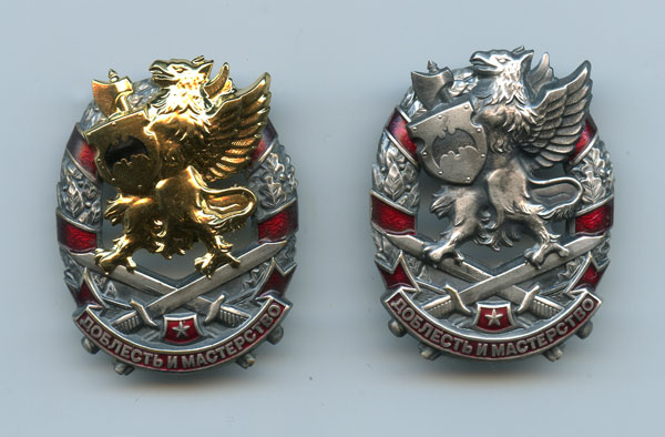 значок